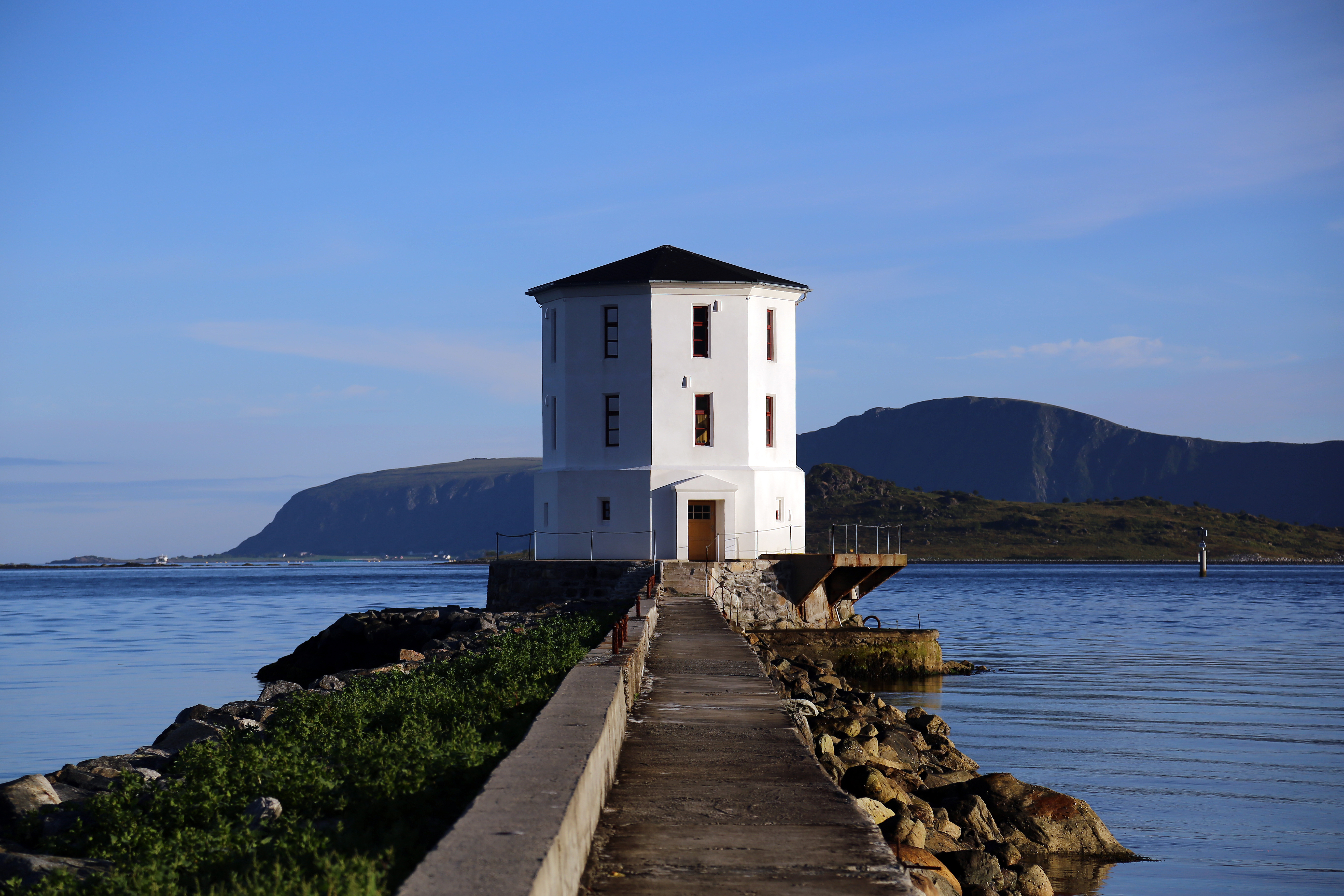 Dette er Lepsøyrev fyr i Haram kommune i Møre og Romsdal